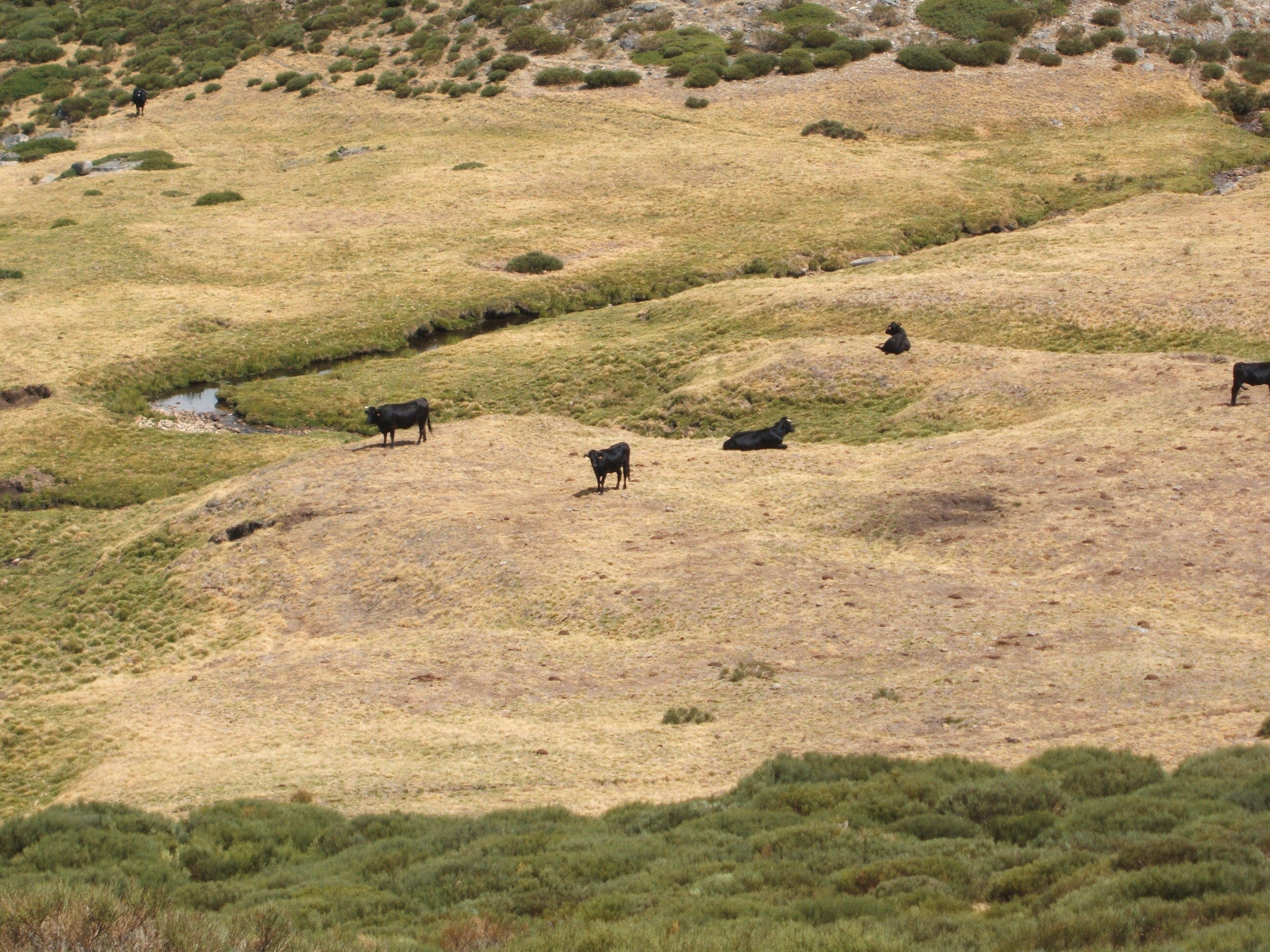 Ganado bovino de la raza avileña negra ibérica pastando en la dehesa de La Serrota. Curso alto del río Corneja. Pradosegar y Villatoro (Ávila, España). AUTOR: Alfredo (con permiso del autor)